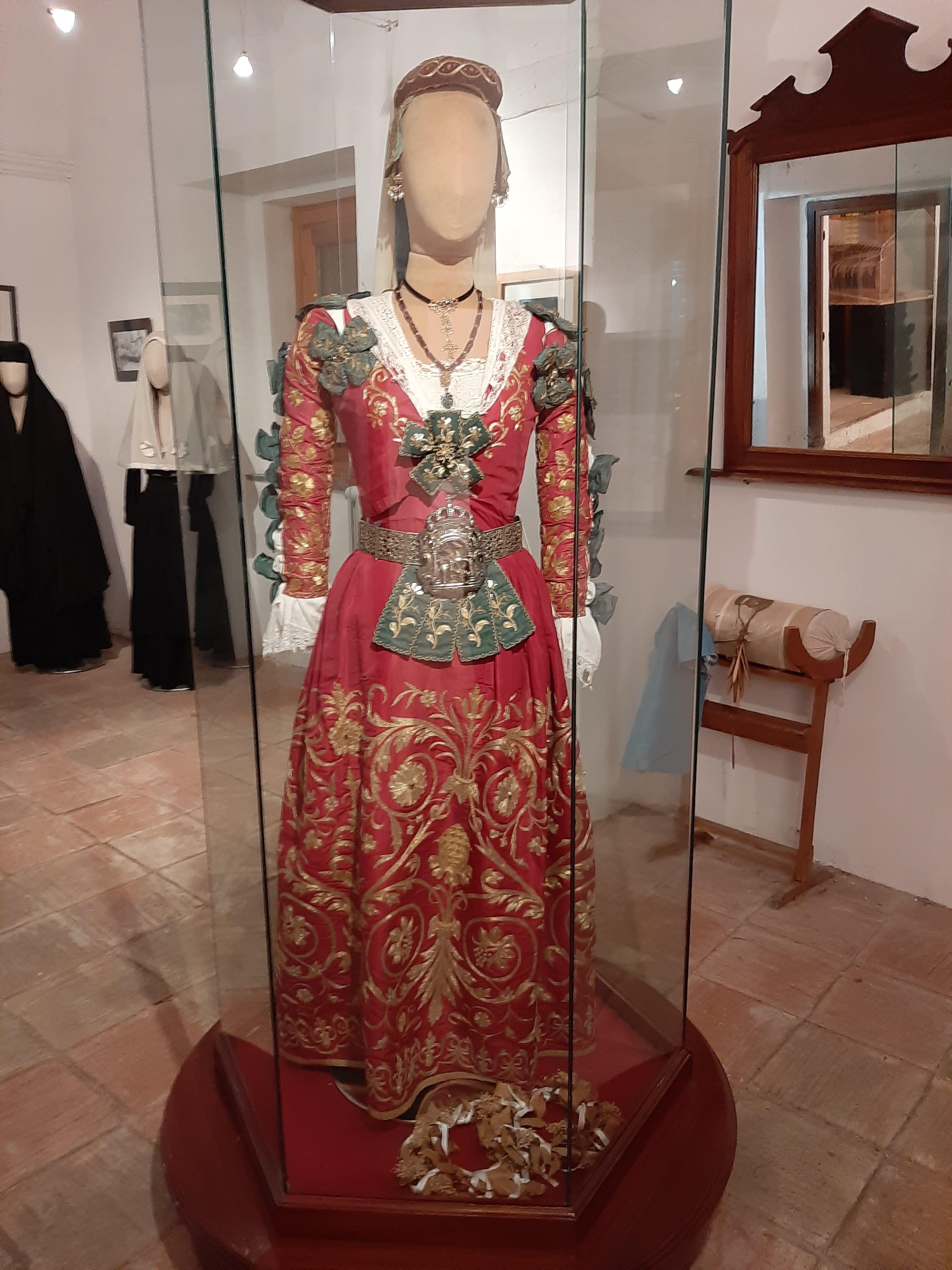 Museo Civico Nicola Barbato - Piana degli Albanesi